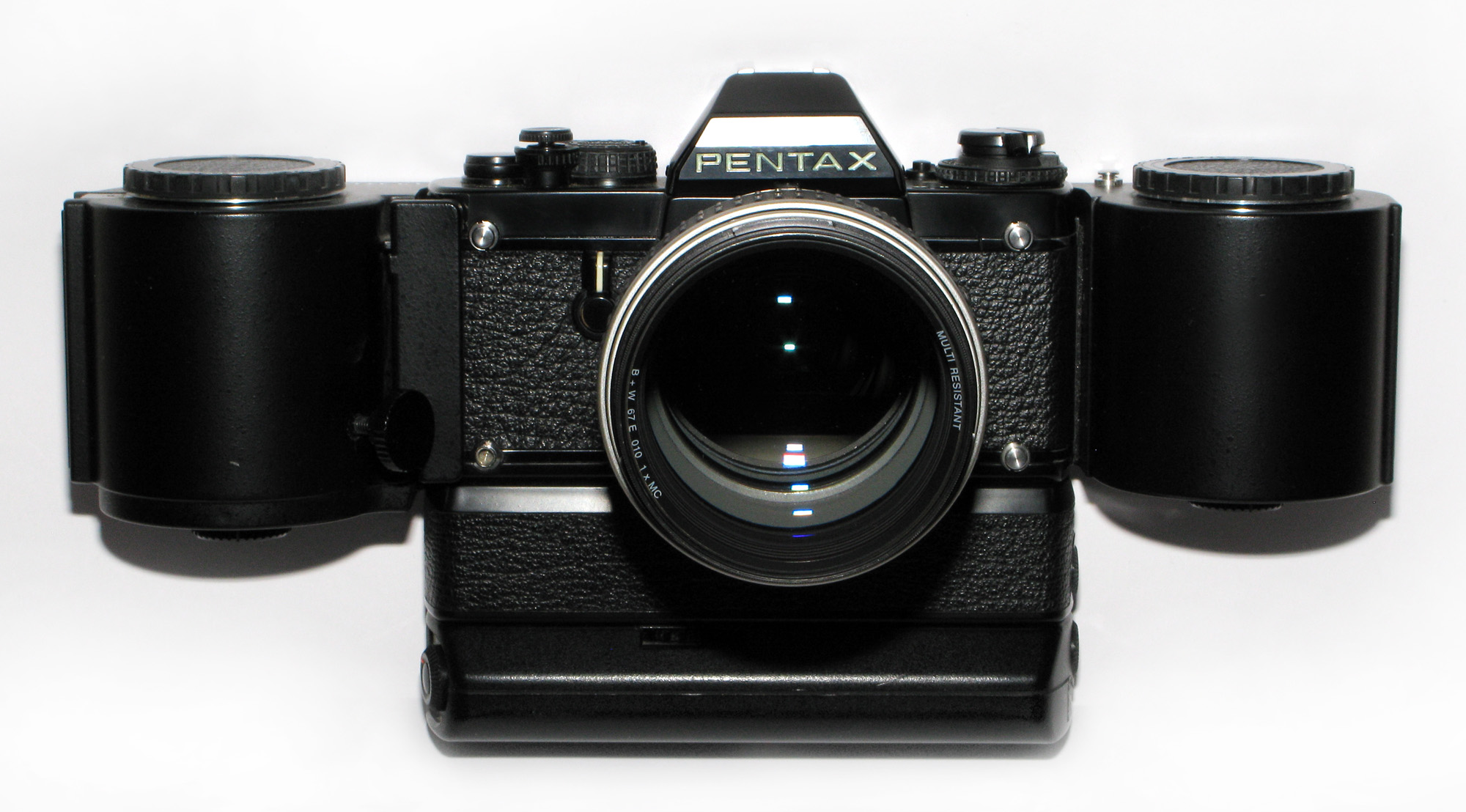 Pentax LX mit MotorDrive LX, NiCd-Pack LX, Langfilmmagazin LX, 1.4/85mm AF*